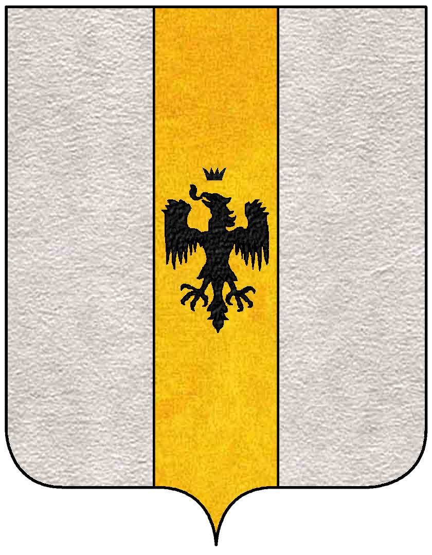 Stemma della famiglia Imperiale